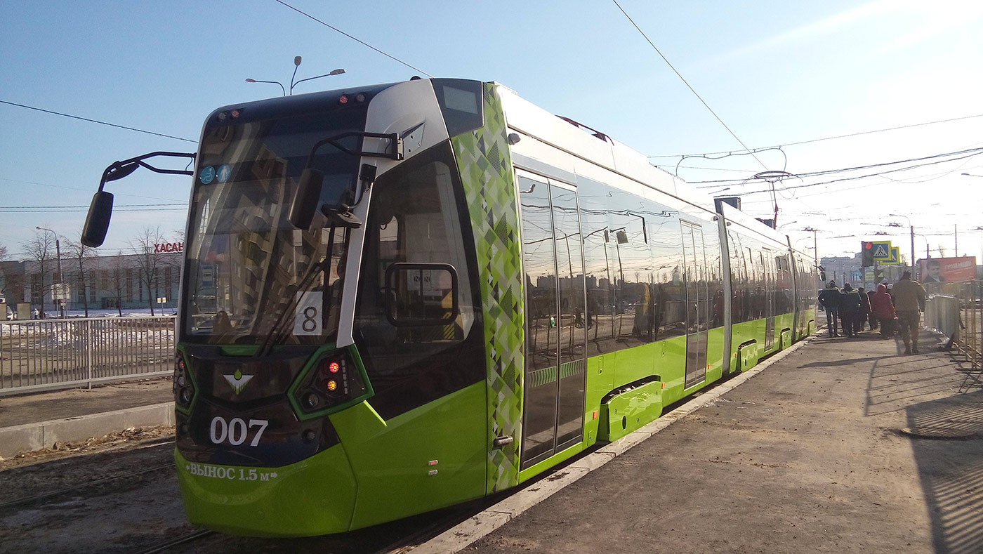 Трамвайный вагон «Чижик» № 007 на пр. Наставников